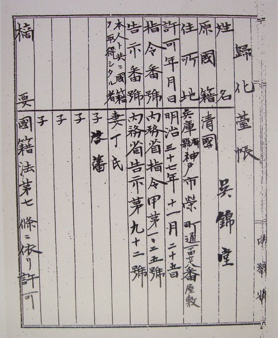 吳錦堂歸化台帳